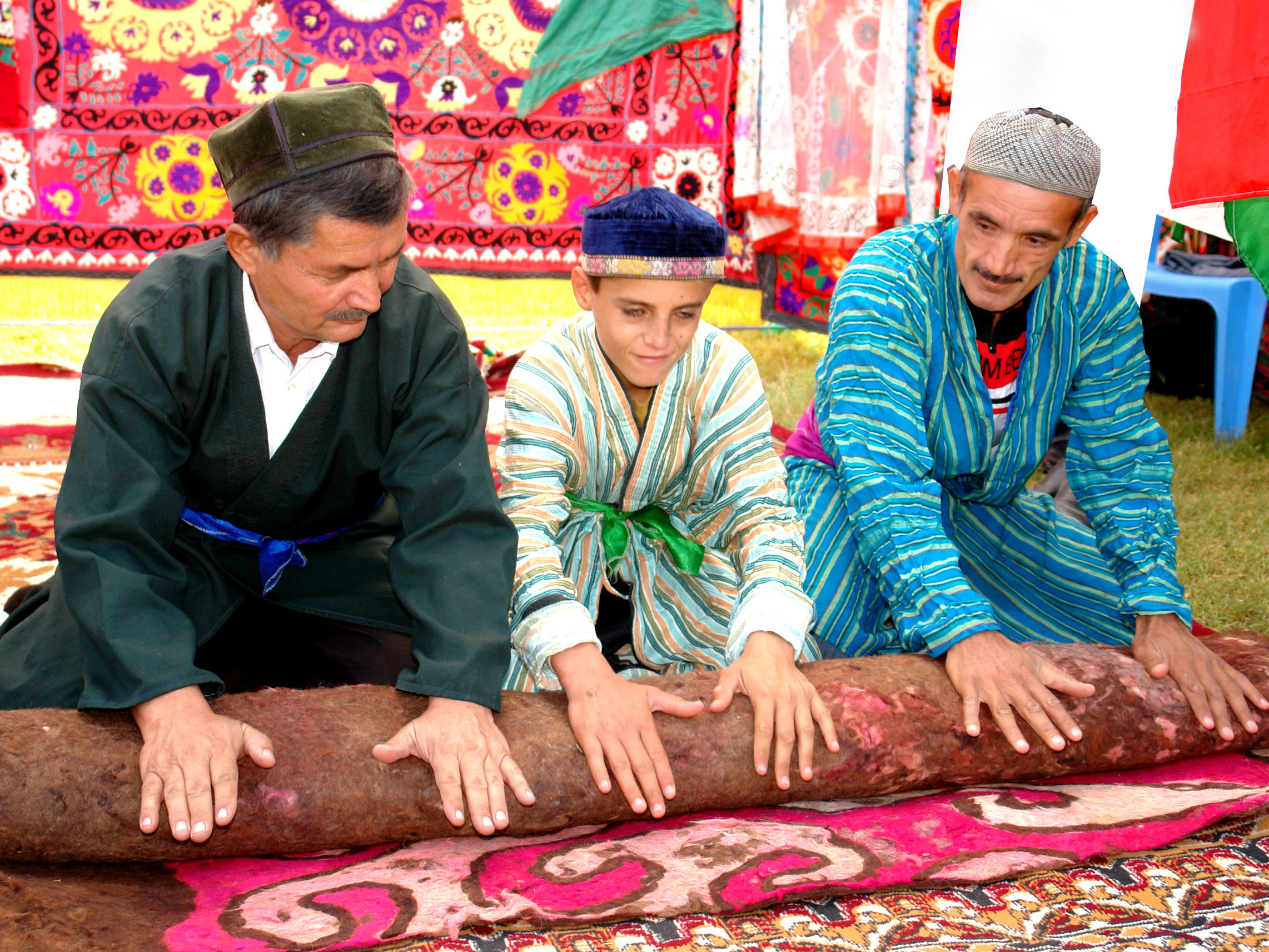 Ремесленники во время выделки кора из шерсти (Гиссар, Таджикистан)